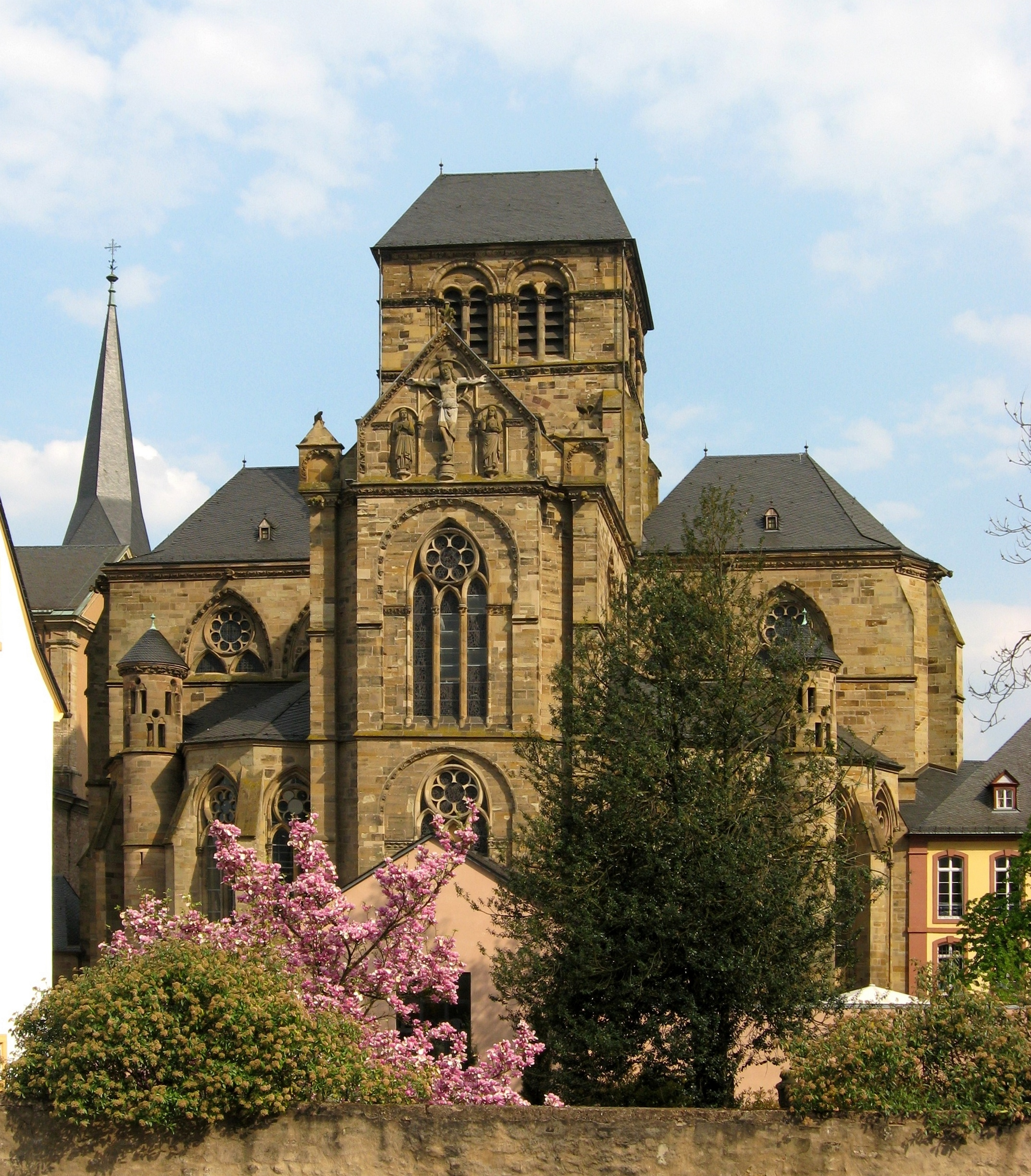 Ansicht in Trier